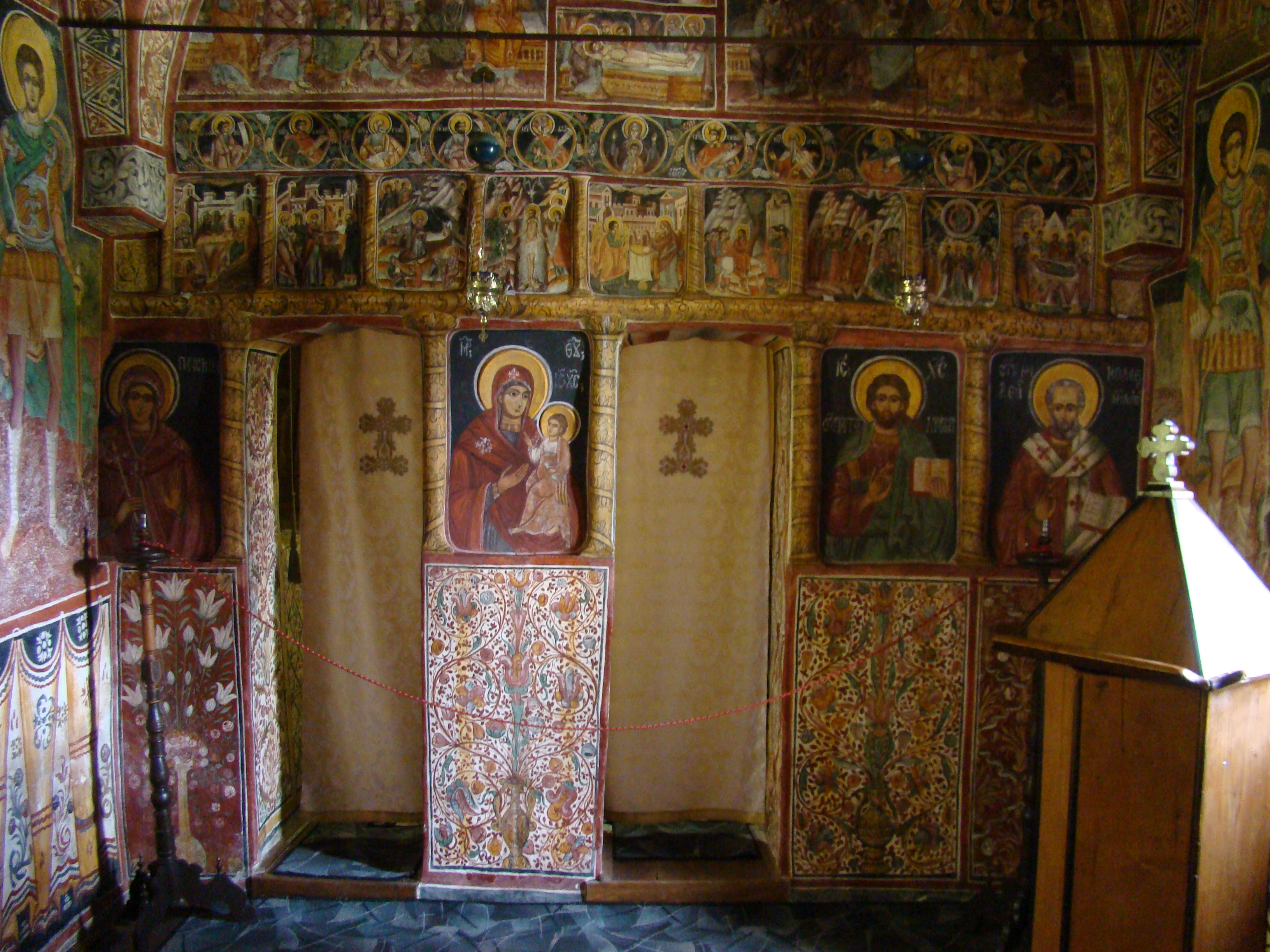 Bolnița Sf.Nicolae, Mănăstirea Polovragi, județul Gorj